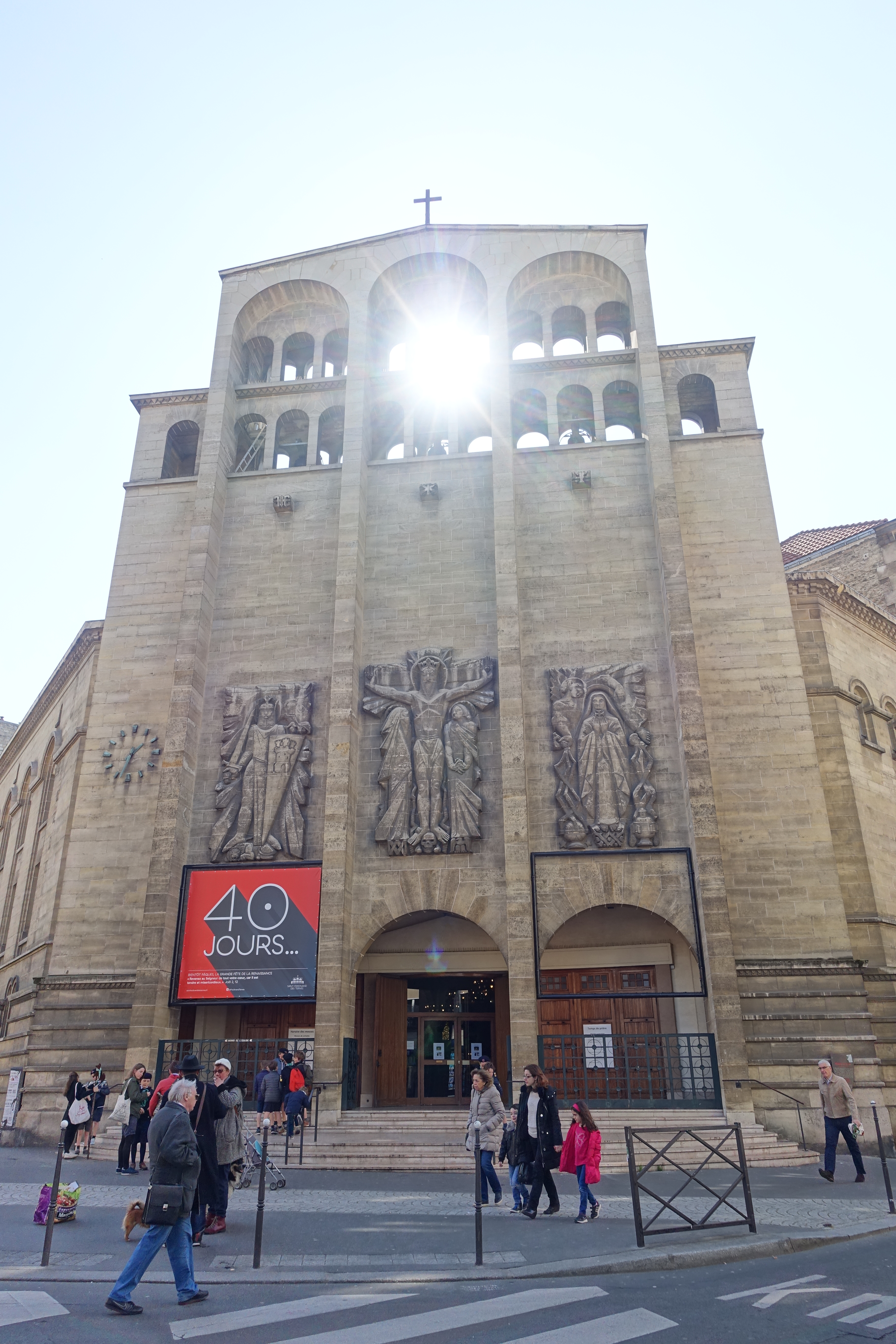 Eglise Saint Ferdinand des Ternes @ Paris Église Saint-Ferdinand-des-Ternes, 27 Rue d'Armaillé, 75017 Paris, France.